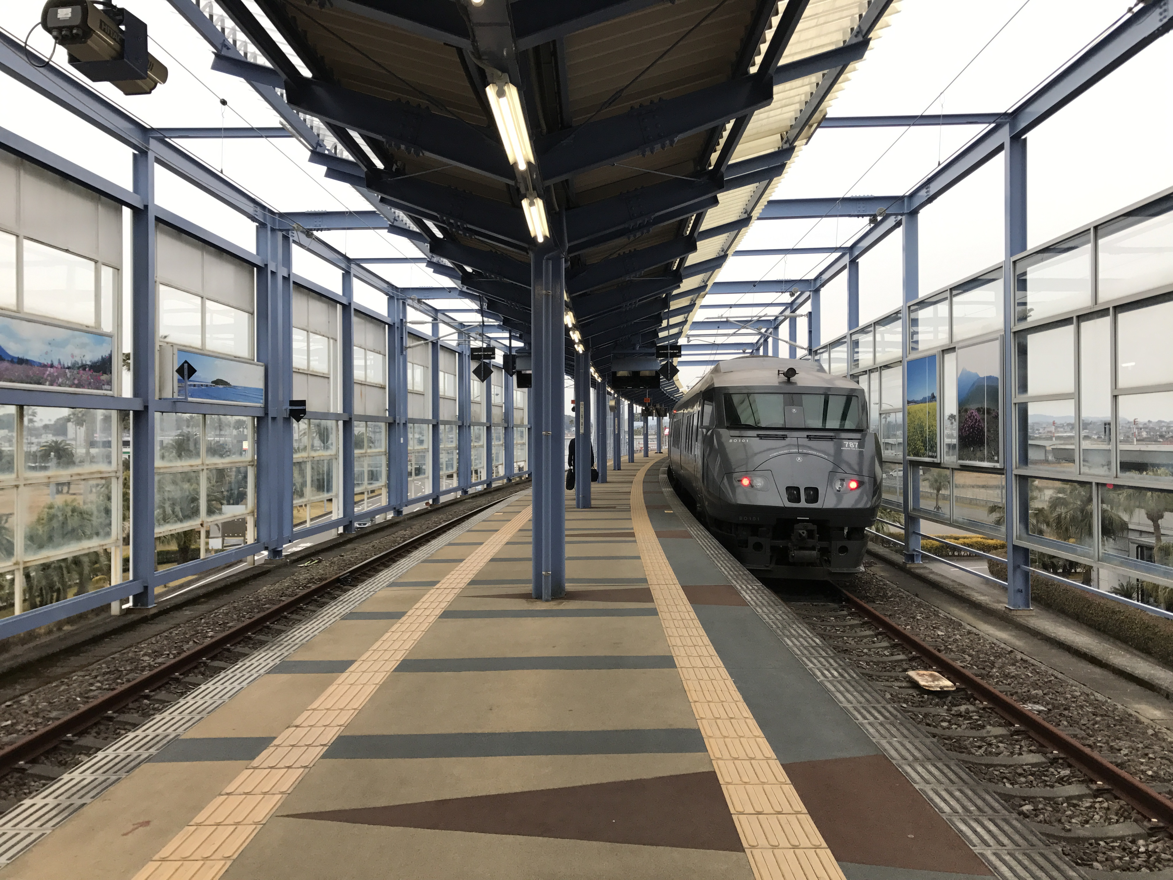 宮崎空港駅のホーム(奥は田吉方面)